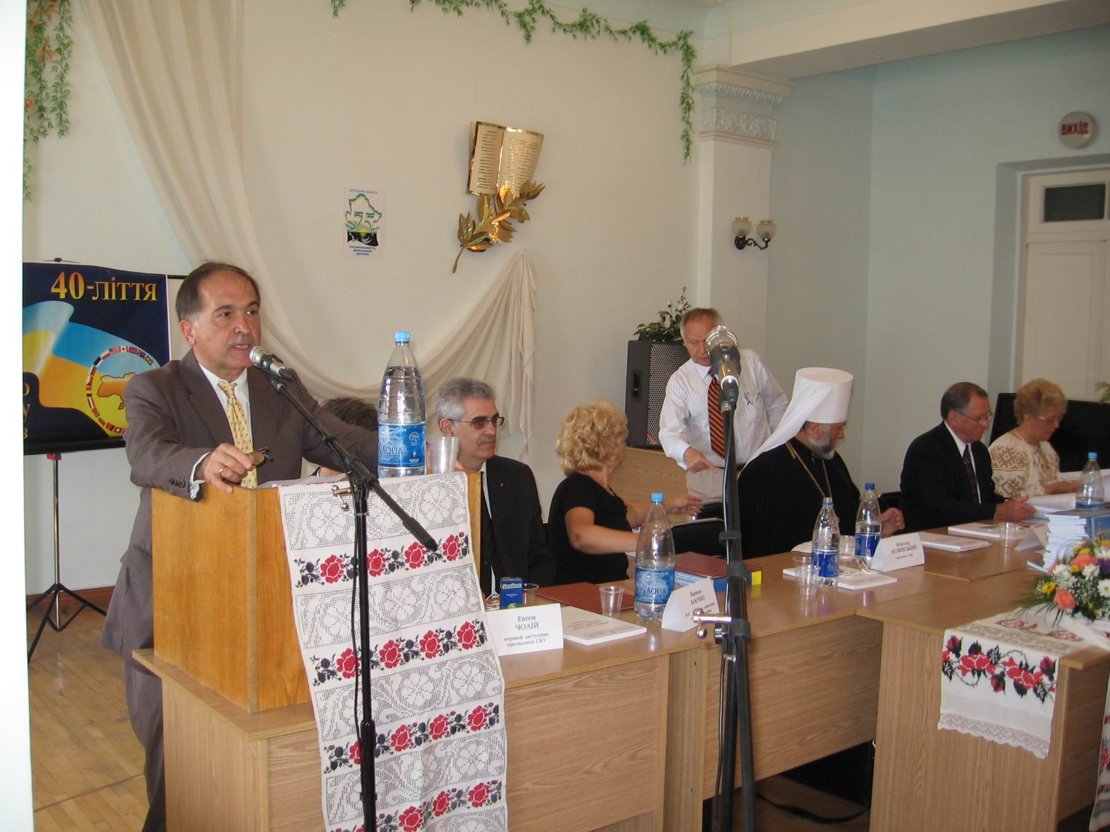 Аскольд Лозинський: Фото